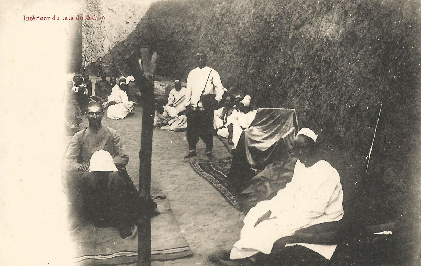 Intérieur du tata du Sultan [Mohamed es-Senoussi] Carte postale ancienne, sans indication d'auteur, d'éditeur ou de date. Collection particulière